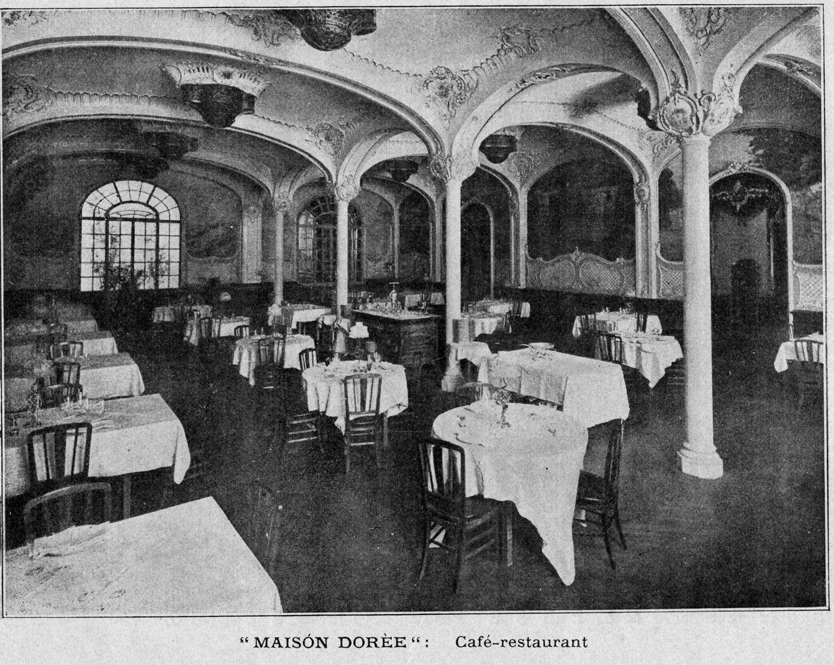 Cafè la "Maixon Dorée" ubicat a C/ Sant Pau 9-11 (Barcelona, Catalunya). Disseny de August Font i Carreras de 1903. Va guanyar el premi anual de l'Ajuntament de Barcelona.